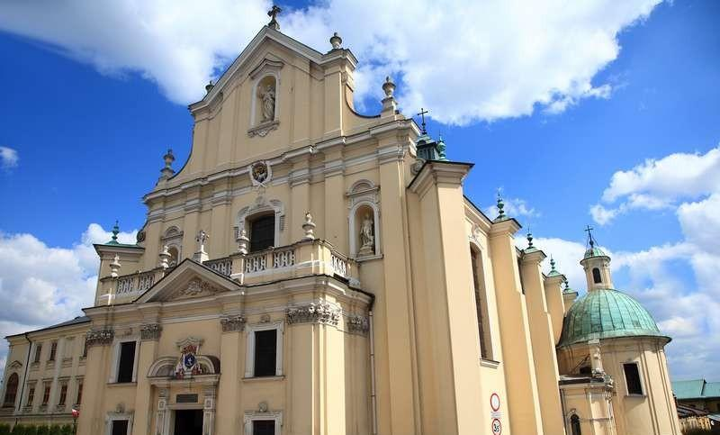 Katedra w Przemyślu